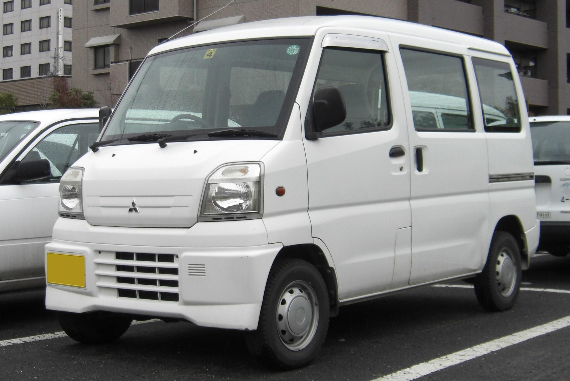 Mitsubishi Minicab Van